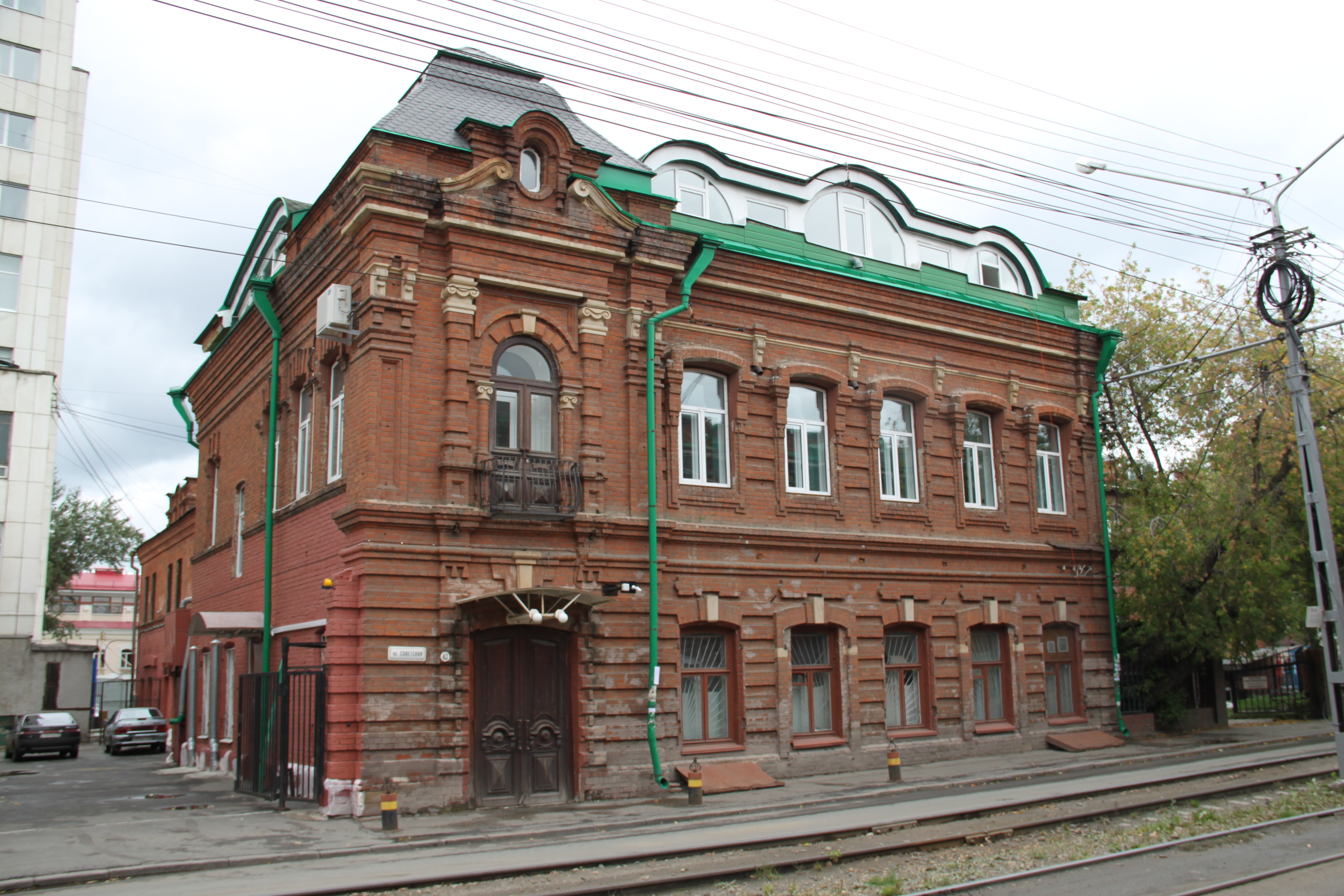 Вид слева